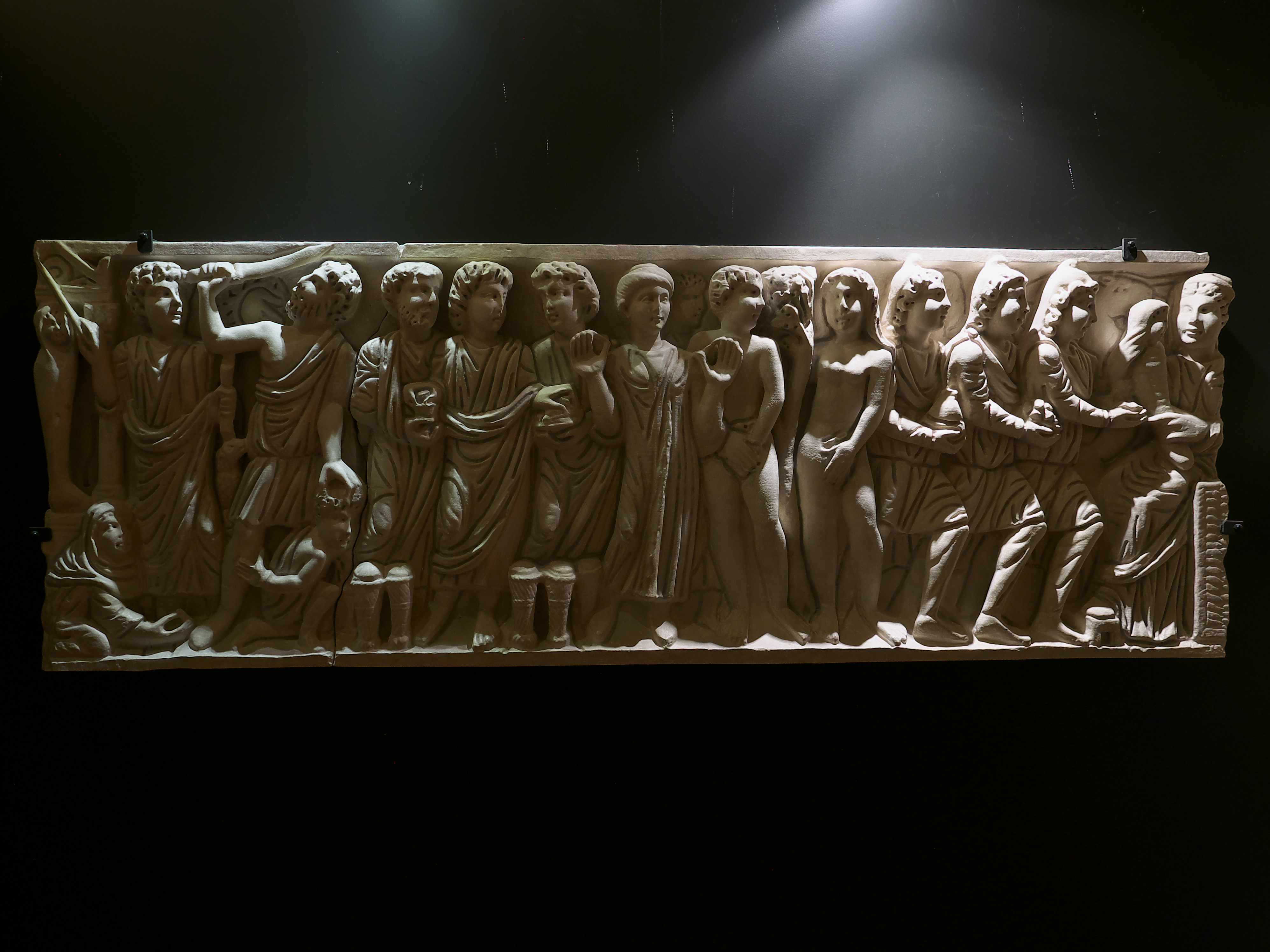 Iglesia de San Román (Toledo). Primer decenio del siglo IV.